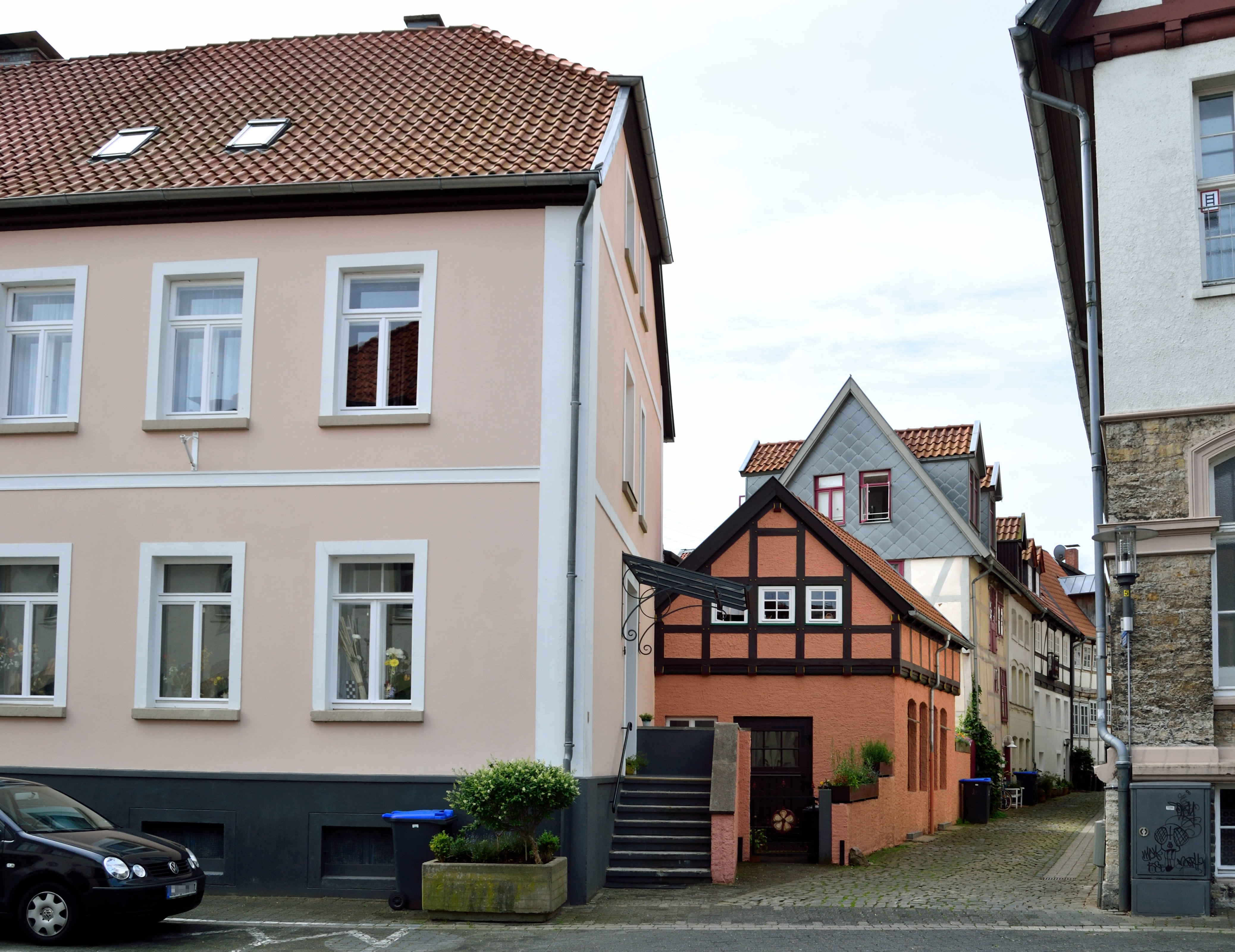 Doppelhaushälfte und Werkstatt This is a photograph of an architectural monument.